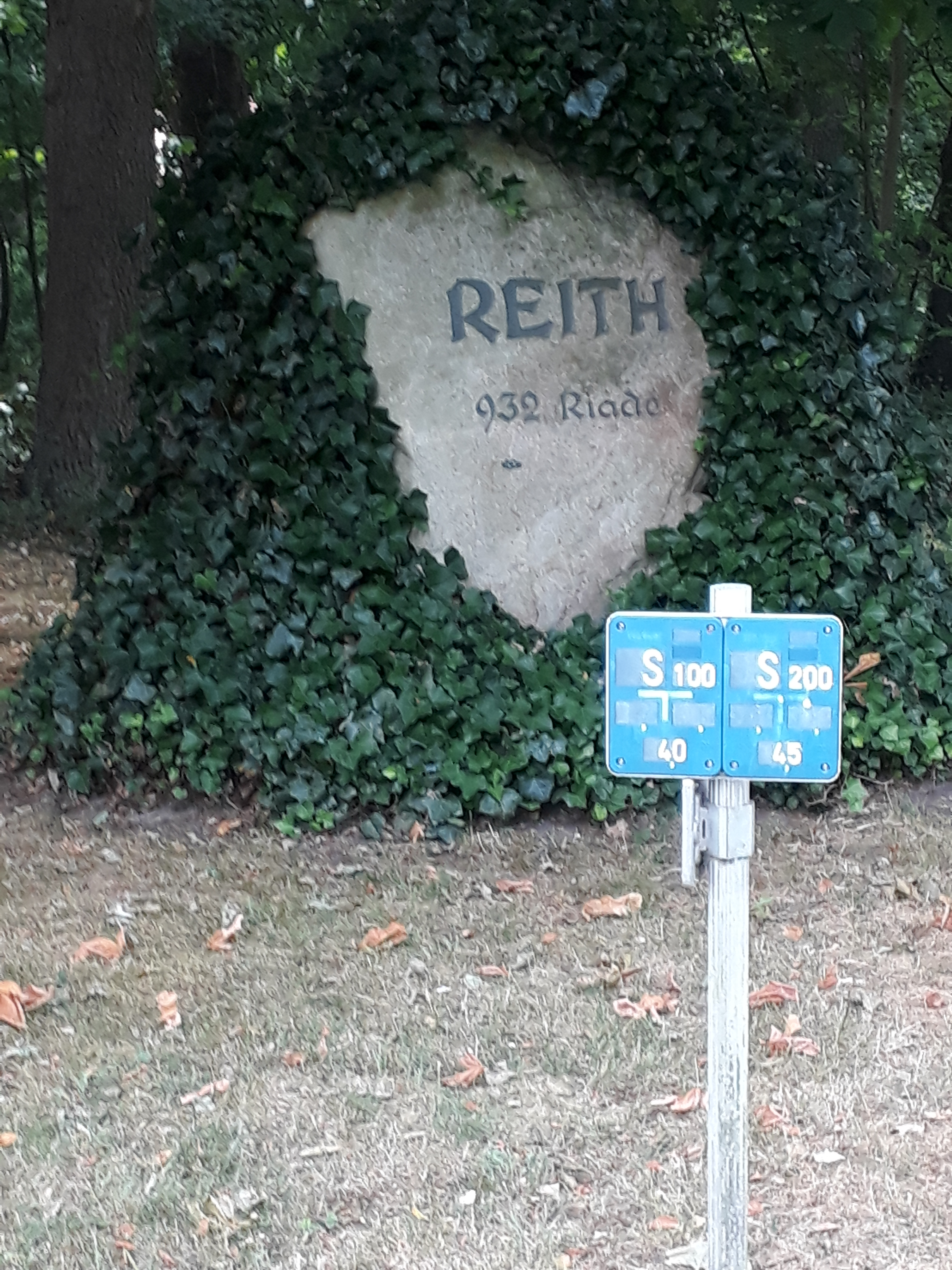 Gedenkstein in Reith, Brest, Nds.